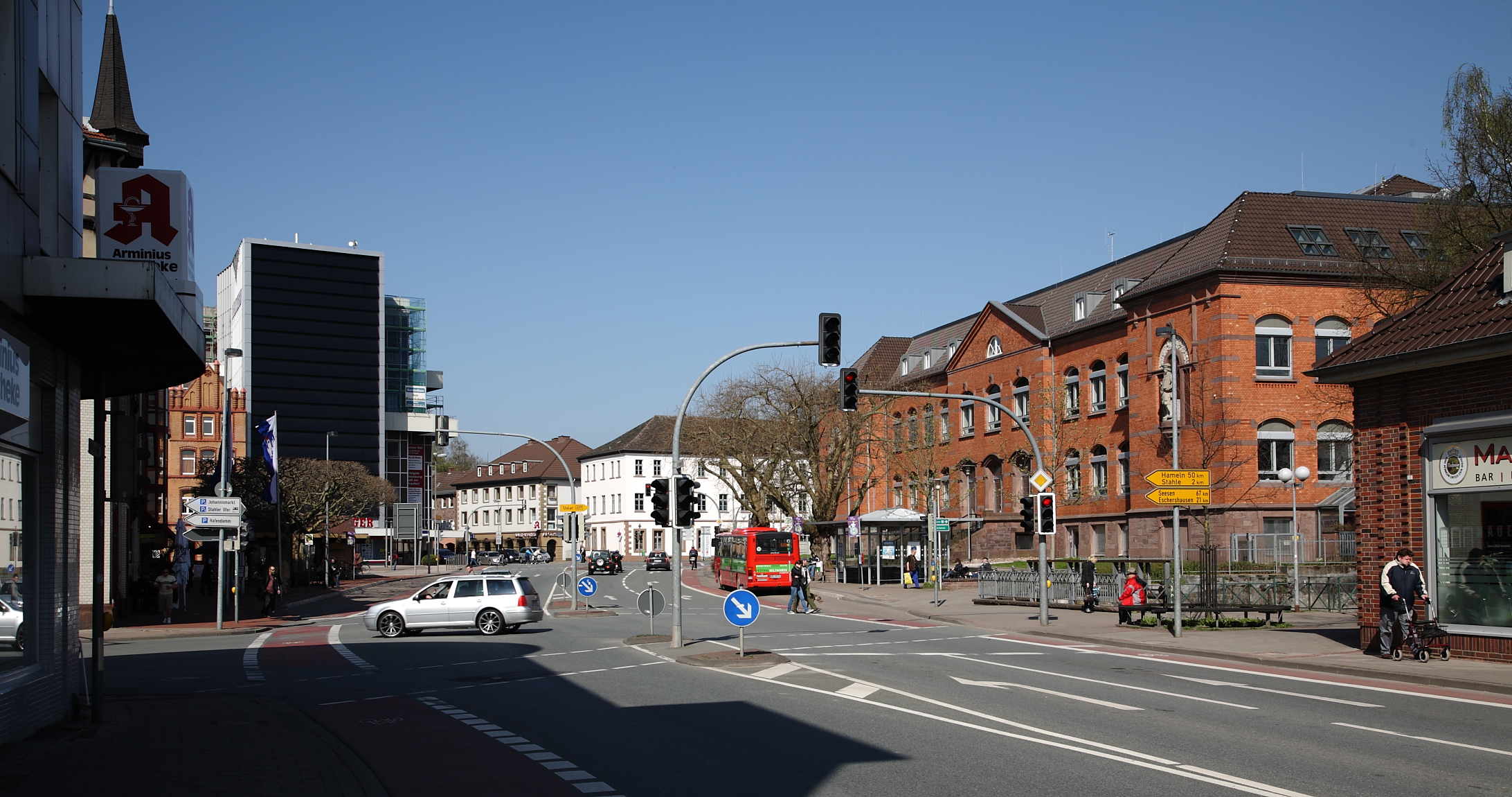 Die Fürstenberger Straße in Holzminden (L550) mit Blick auf den Haarmannplatz, benannt nach Friedrich Ludwig Haarmann dem Gründer der ersten deutschen Baugewerkschule. Rechts das Gebäude der HAWK Hochschule Hildesheim/Holzminden/Göttingen